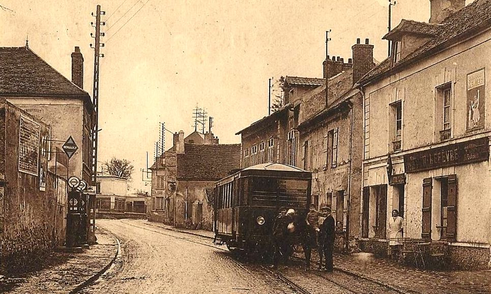 L'autorail Renault-SCEMIA n° A 1 (type RS1) du tramway de Meaux à Dammartin dans une rue du village.